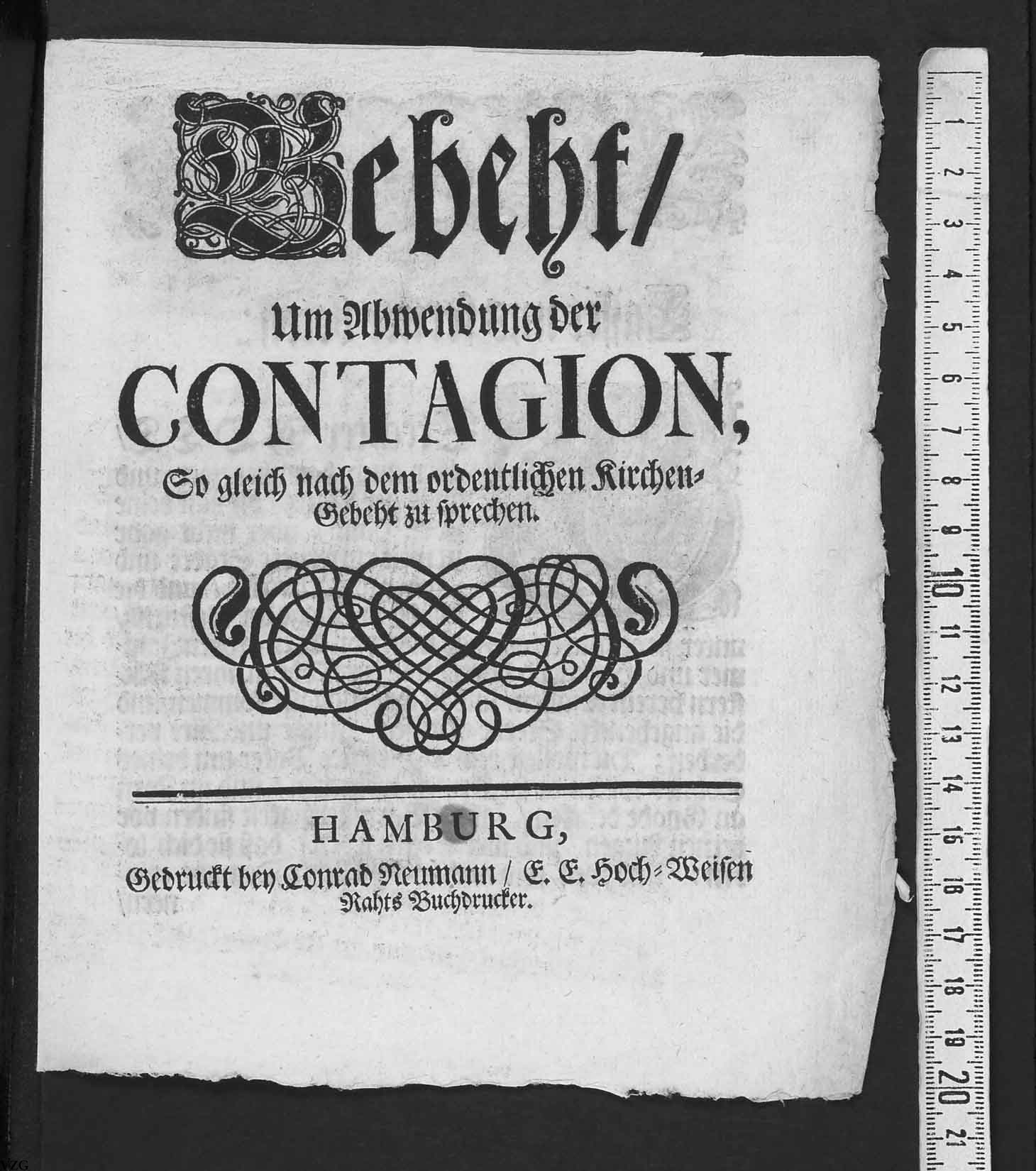 Gebeht um Abwendung der Contagion, Hamburg: Neumann, ca 1700